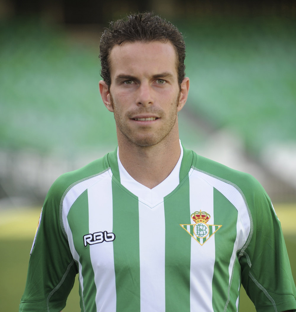 Fernando Vega con la camiseta del Real Betis